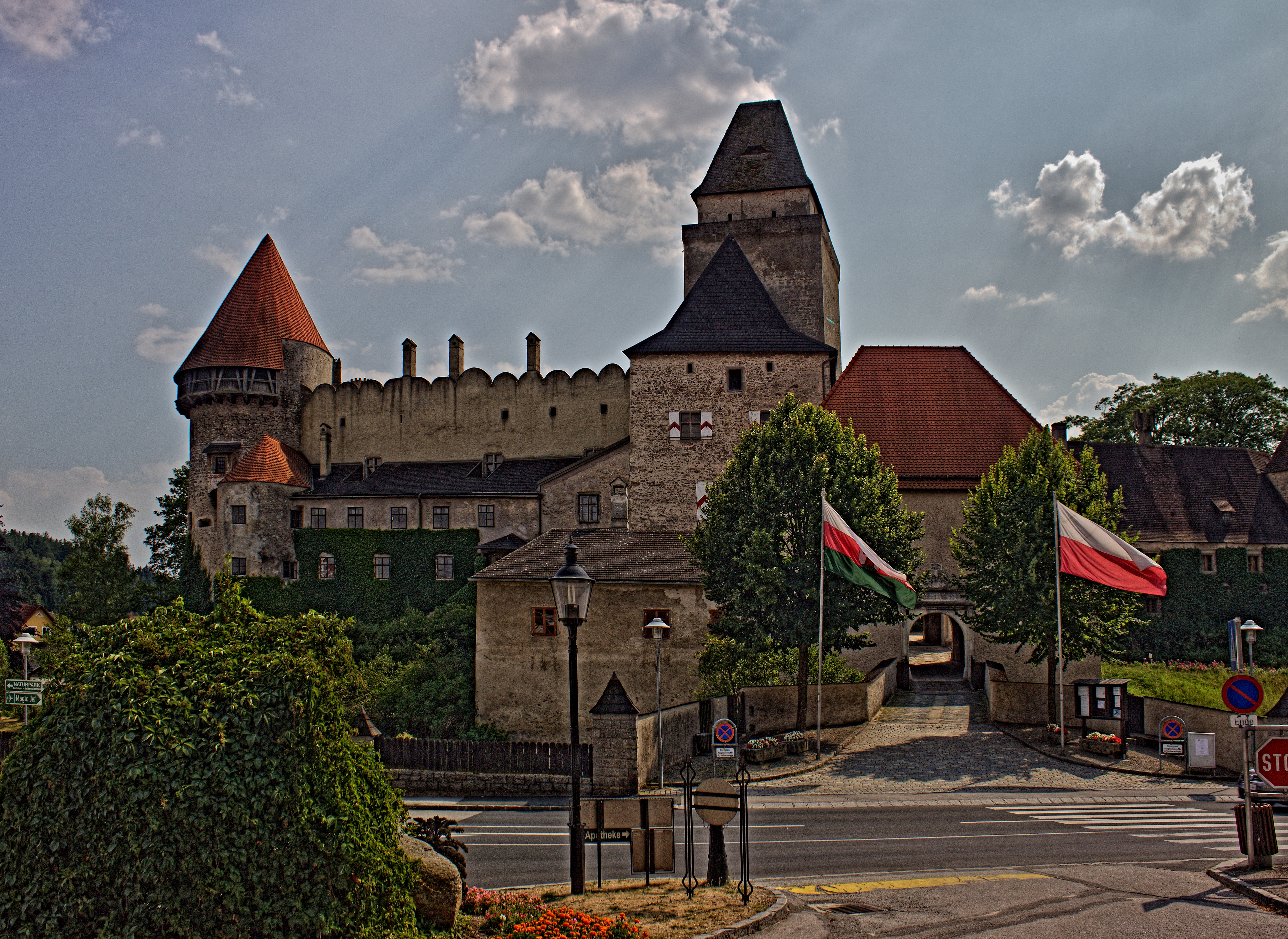 Burg Heidenreichstein